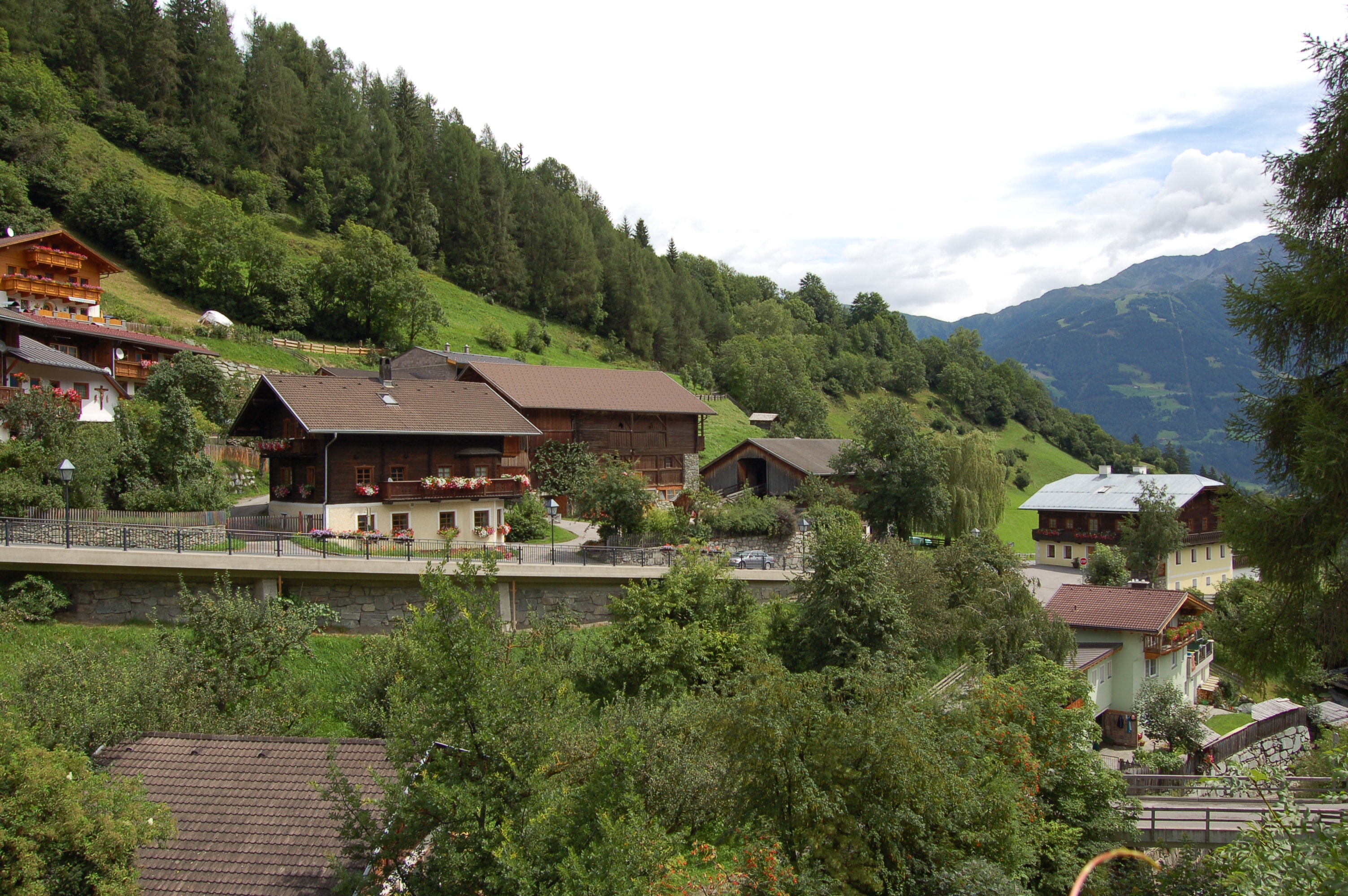 der Dorfkern von Mitteldorf am Mitteldorfer Bach, Gemeinde Virgen (Osttirol)